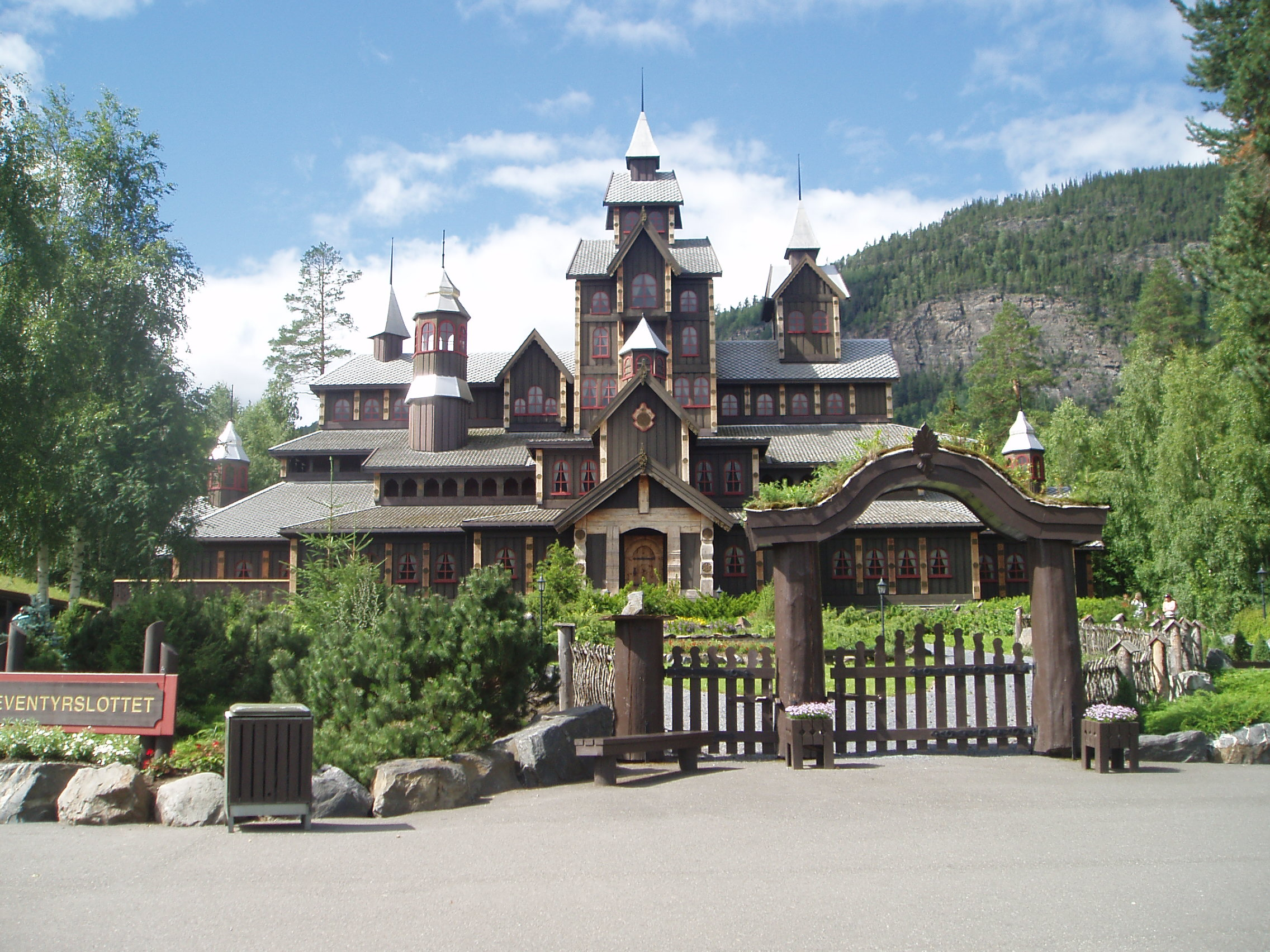 «Eventyrslottet» på Hunderfossen familiepark